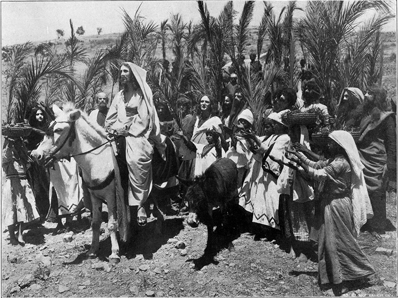 From the Manger to the Cross ('1913), production Kalem, réalisation Sidney Olcott avec Robert Henderson Bland.